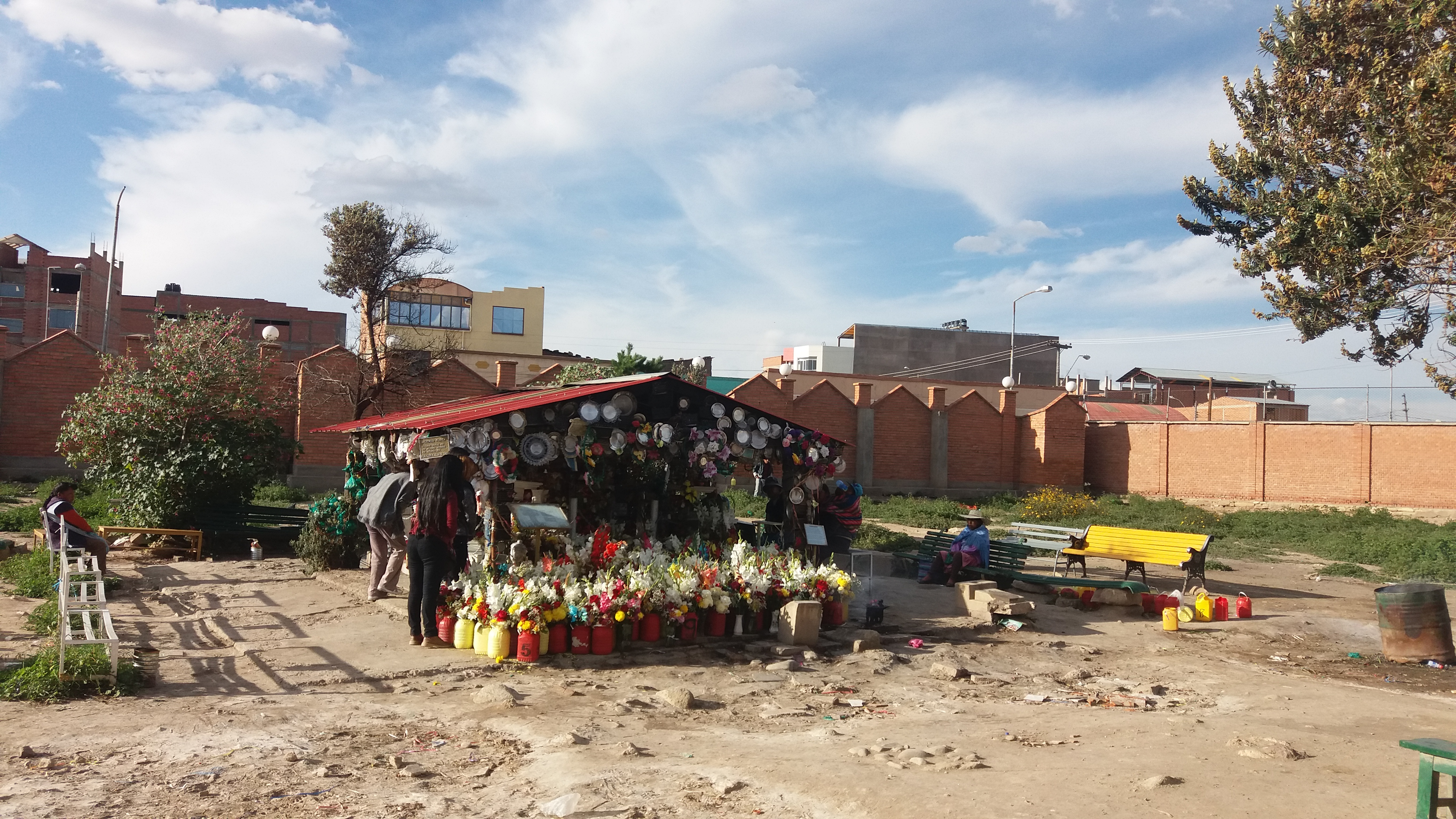 plano general de la tumba de Inocencia Flores, Oruro